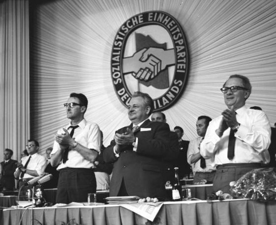 Title: Karl-Marx-Stadt, Bezirksdelegiertenkonferenz der SED People in the image: Roscher, Paul: Mitglied des ZK der SED, DDR Honecker, Erich: Staatsratsvorsitzender, Generalsekretär des ZK der SED, DDR (GND 118553399) Factual corrections and alternative descriptions are encouraged separately from the original description. Additionally errors can be reported at this page to inform the Bundesarchiv. Original historic description: Zentralbild-Koard-16.5.71 Karl-Marx-Stadt: Bezirksdelegiertenkonferenz der SED Paul Roscher, Mitglied der ZK (Mitte) wurde am 16.5.71 als 1. Sekretär der SED-Bezirksleitung wiedergewählt. Rechts: Erich Honecker, Erster Sekretär des ZK der SED.